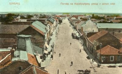 Karađorđeva ulica i Donji šor, posle 1905.